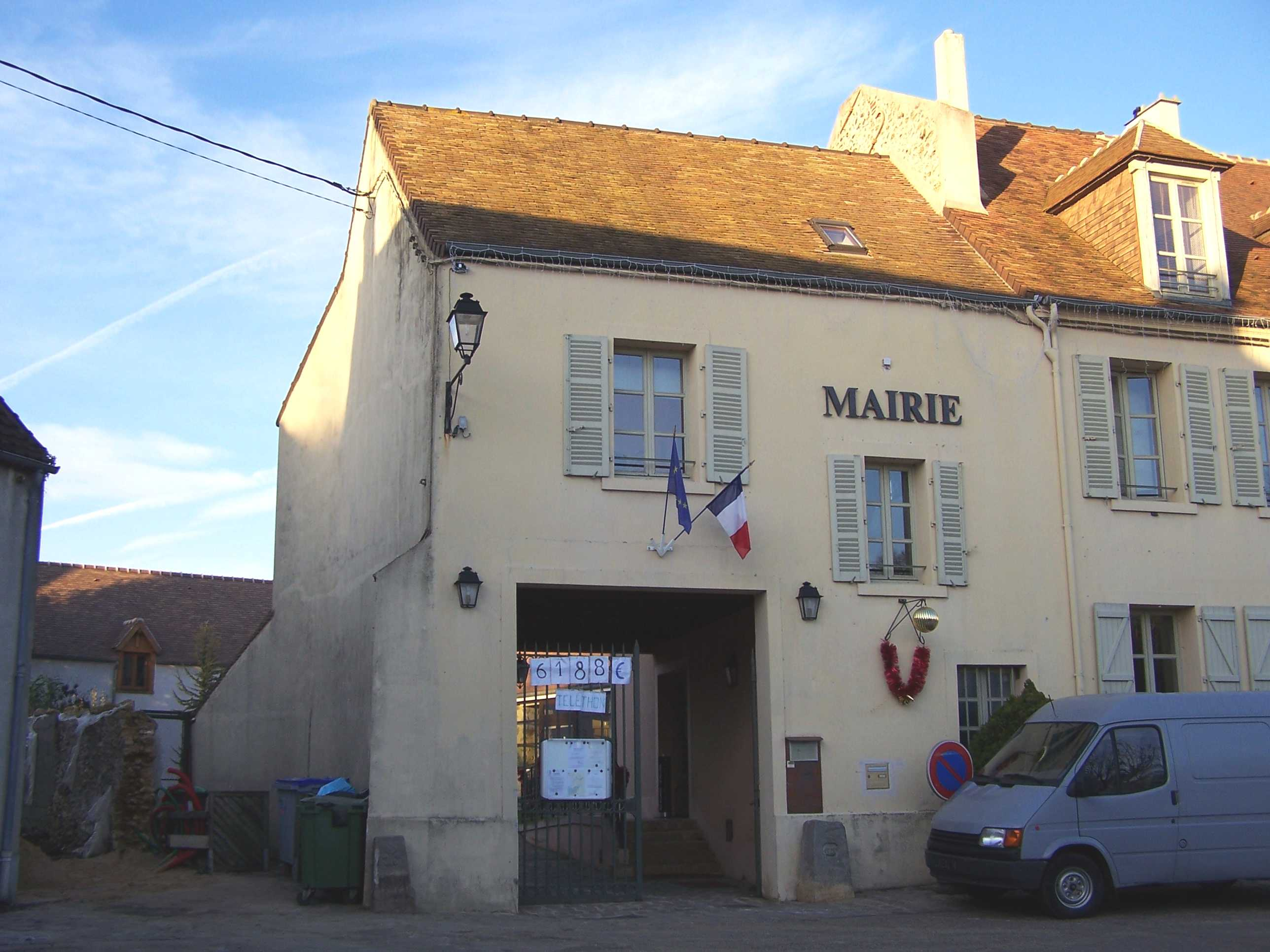 Mairie de Châteaufort (Yvelines, France)